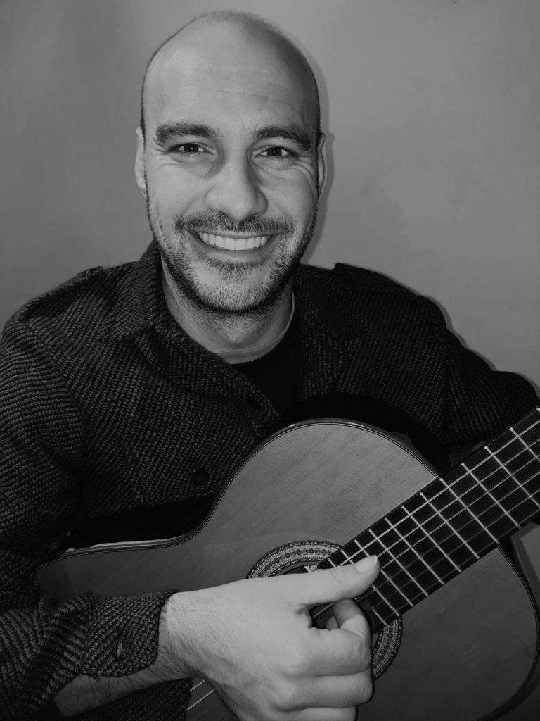 El Alemán 2019